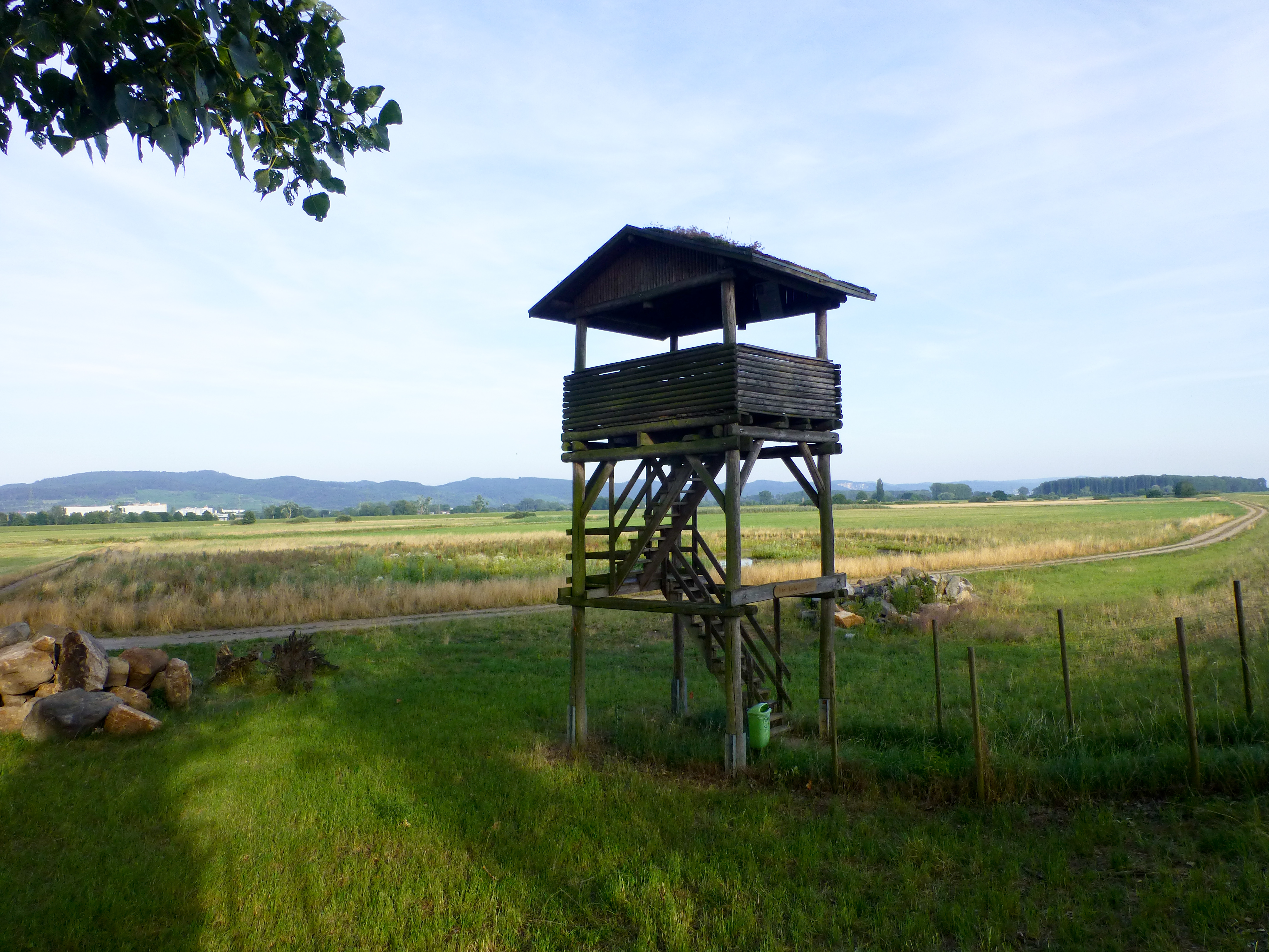 Hans-Ludwig-Turm an der Weschnitzinsel nahe der Herrenbrücke